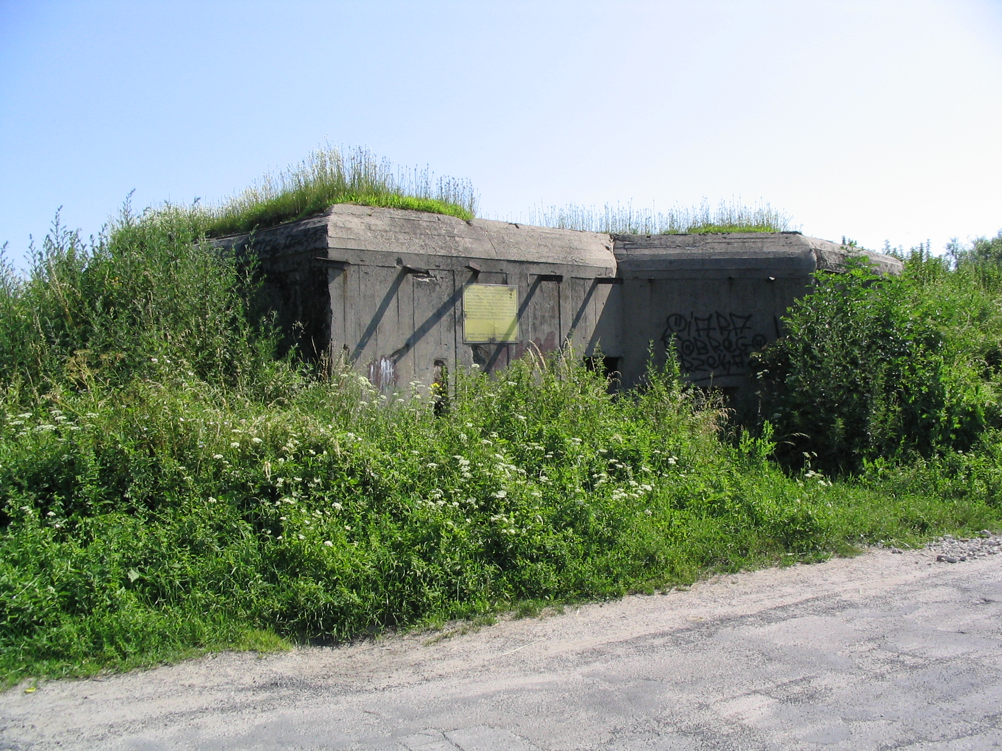 Żelbetonowy schron Przemyskiego Rejonu Umocnionego - części Linii Mołotowa. Wybudowany przez Rosjan w latach 1940-1941 w miejscu przebiegu rdzenia Twierdzy Przemyśl do obrony granicy Sowiecko-Niemieckiej na Sanie. Obiekt jednokondygnacyjny, wieloizbowy, uzbrojony w trzy ciężkie karabiny maszynowe do ognia czołowego oraz ręczny karabin maszynowy do obrony wejścia. W schronie znajdowały się m.in. śluza gazowa, peryskop, studnia i wyjście ewakuacyjne. Obiektem opiekuje się Szkoła Podstawowa nr 15 w Przemyślu